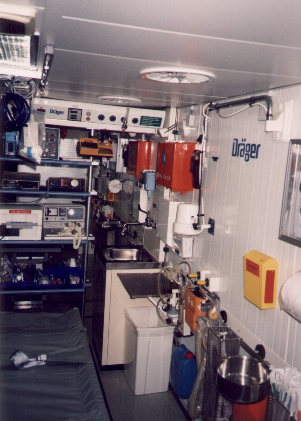 Tunnelrettungszug Schnellfahrstrecke Stuttgart Mannheim Notarztarbeitsplatz 1 im Sanitätswagen des Tunnelrettungszug Schnellfahrstrecke Stuttgart Mannheim.